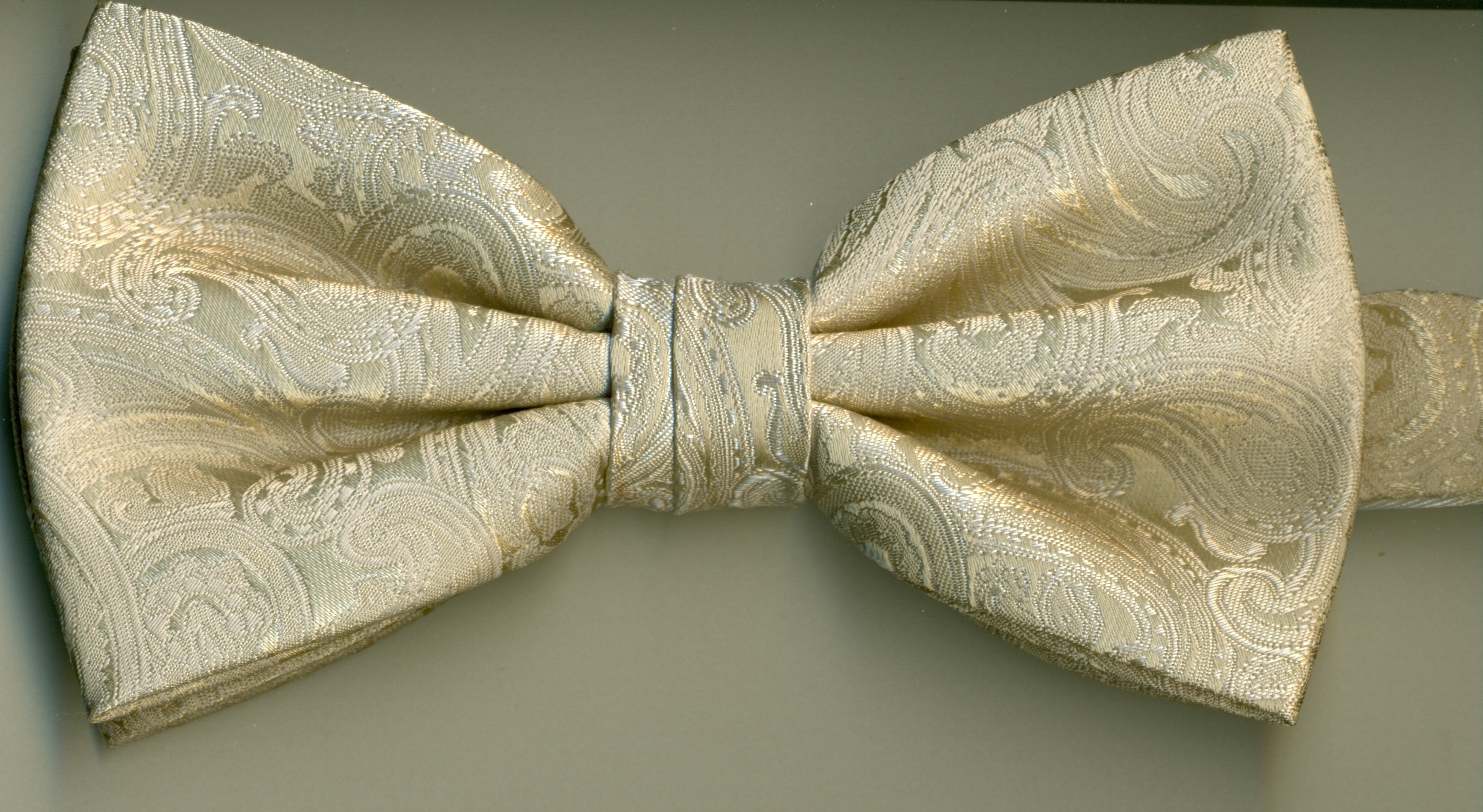 Fliege mit Paisleymuster ecrú, Seide